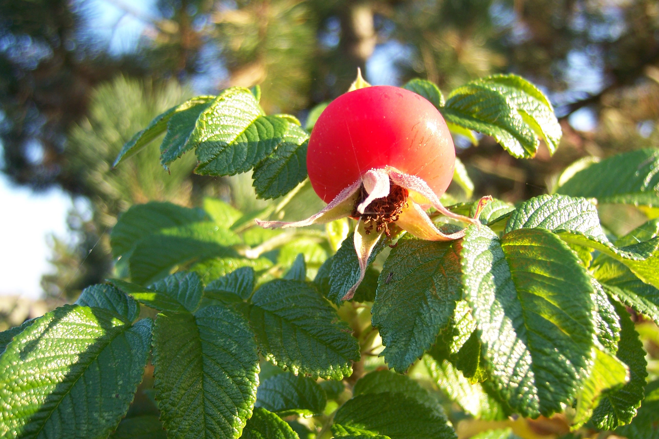 Nordseeinsel Spiekeroog. Kartoffelrose (rosa rugosa)